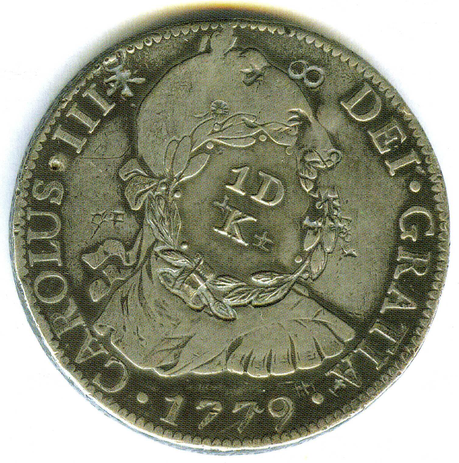 Moneda conmemorativo utilizada en Hawaii.